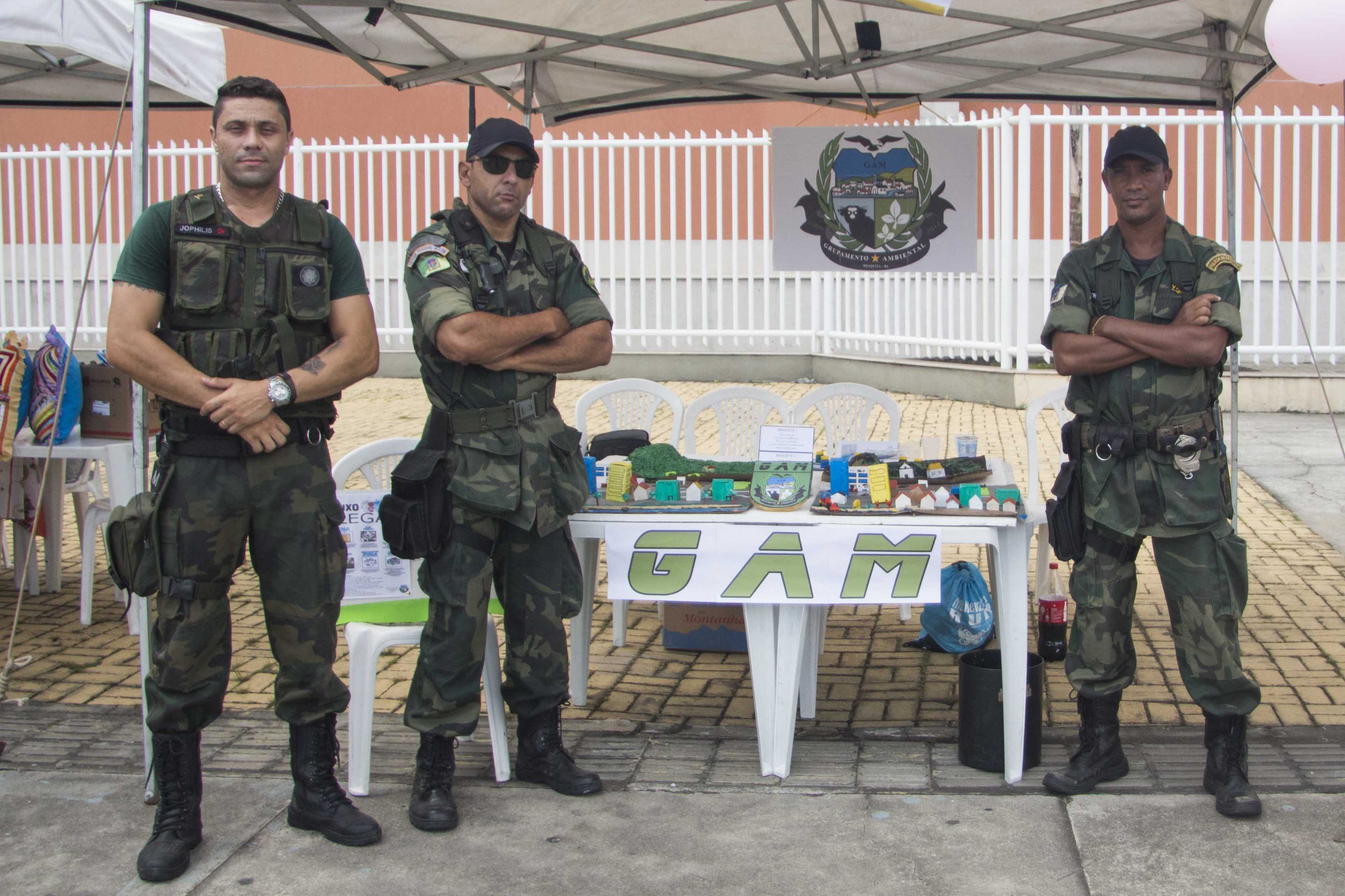 Da esquerda para a direita: Gilmar Jophilis (Coordenador de Meio Ambiente e Chefe do GAM), Marcos Braga e Anderson Salles